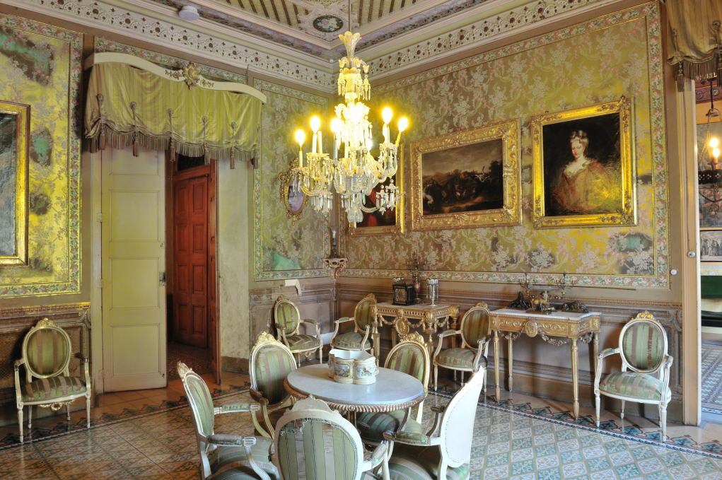 Sala dels Àustries del Museu Palau Mercader de Cornellà de Llobregat feta pel fotògraf M.A. Tabernero